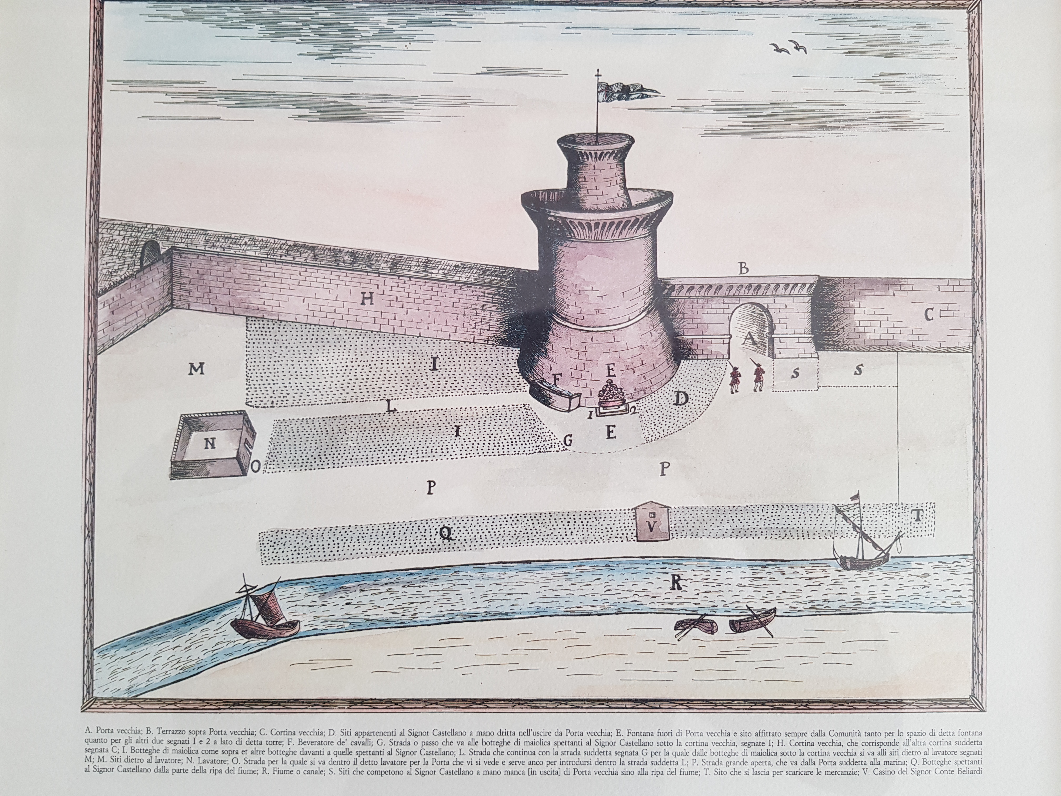 Torrione isotteo e porta di ingresso alla città dal fiume